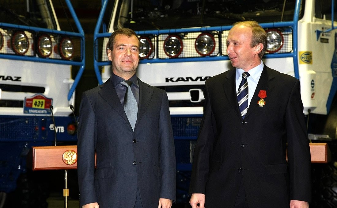 Дмитрий Медведев, Владимир Чагин